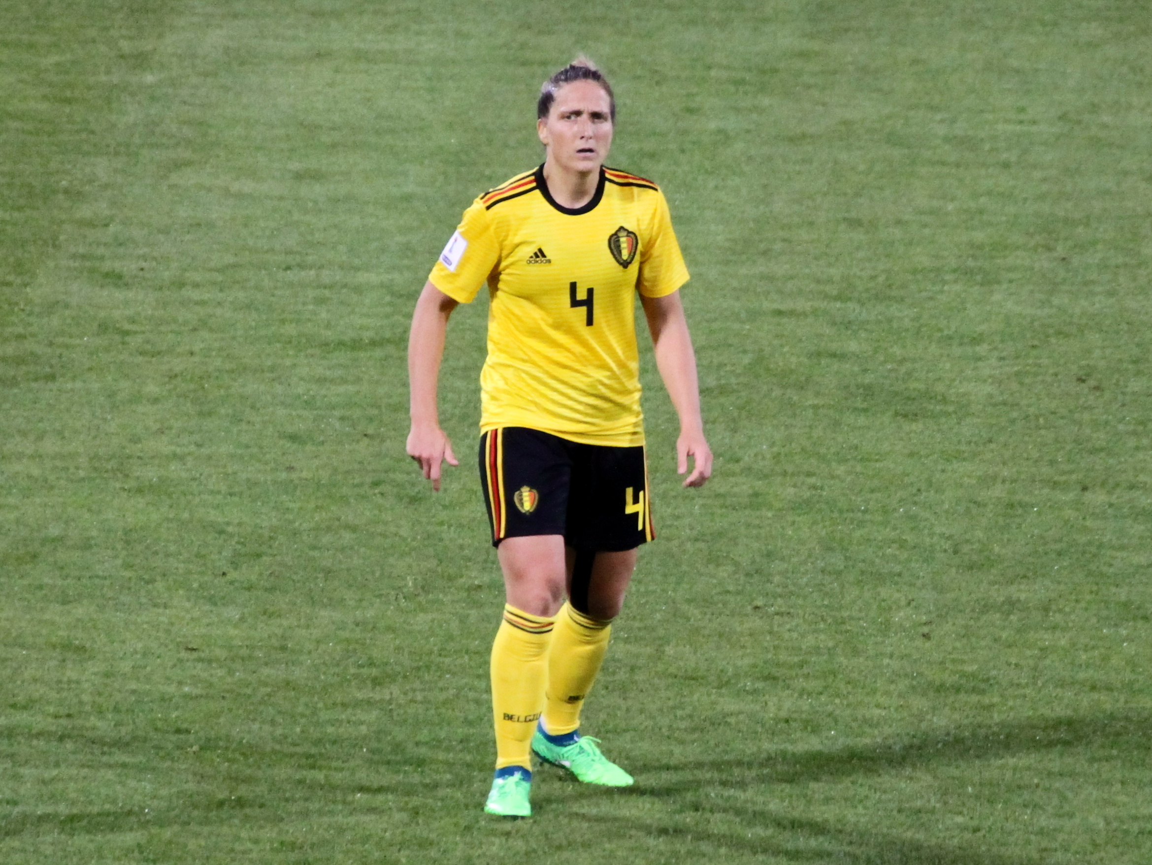 Maud Coutereels, difensore della nazionale di calcio femminile del Belgio, durante l'incontro Italia-Belgio del 10 aprile 2018 allo stadio Paolo Mazza di Ferrara.